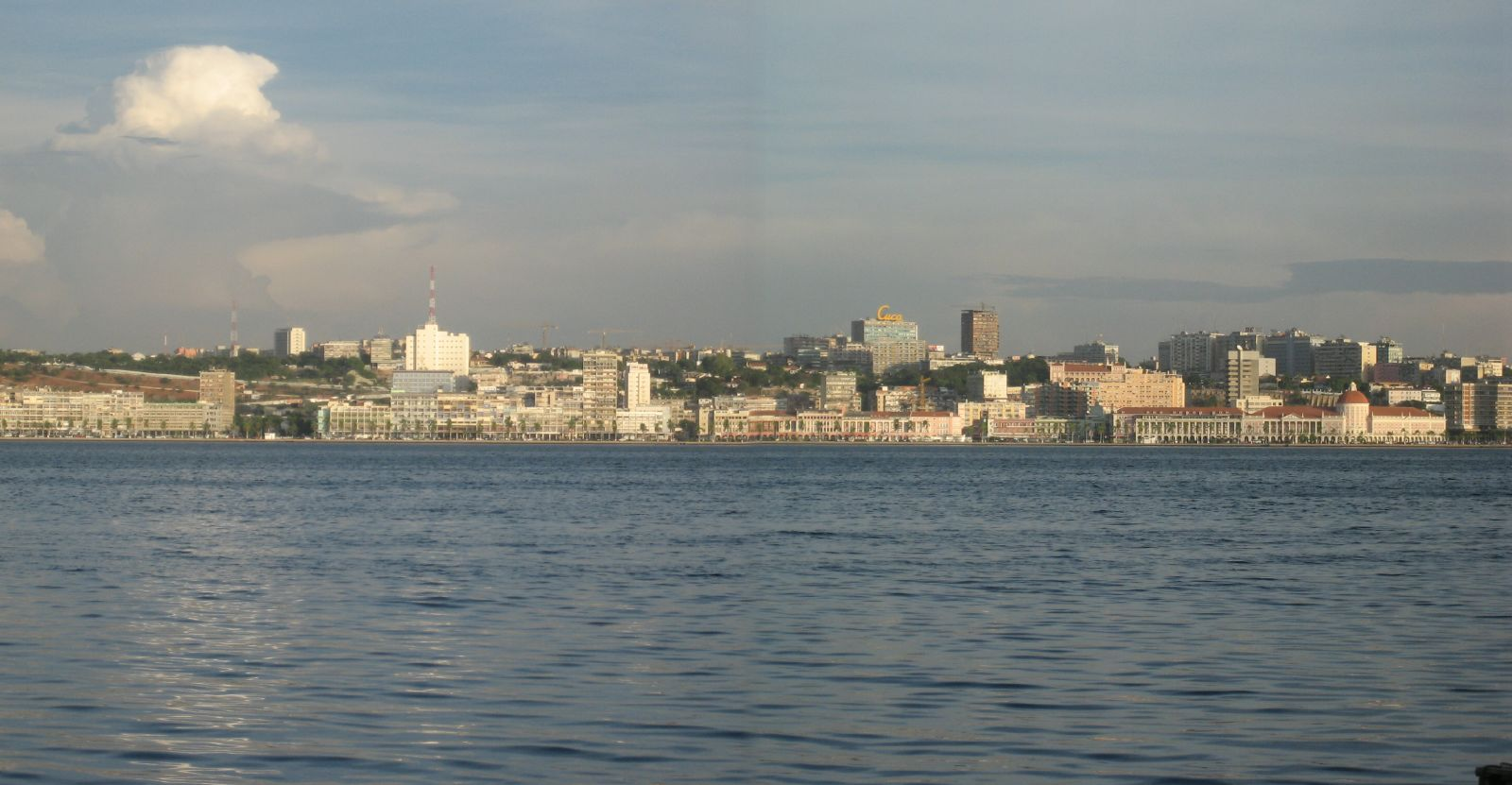 Vista panorâmica de Luanda, Angola.